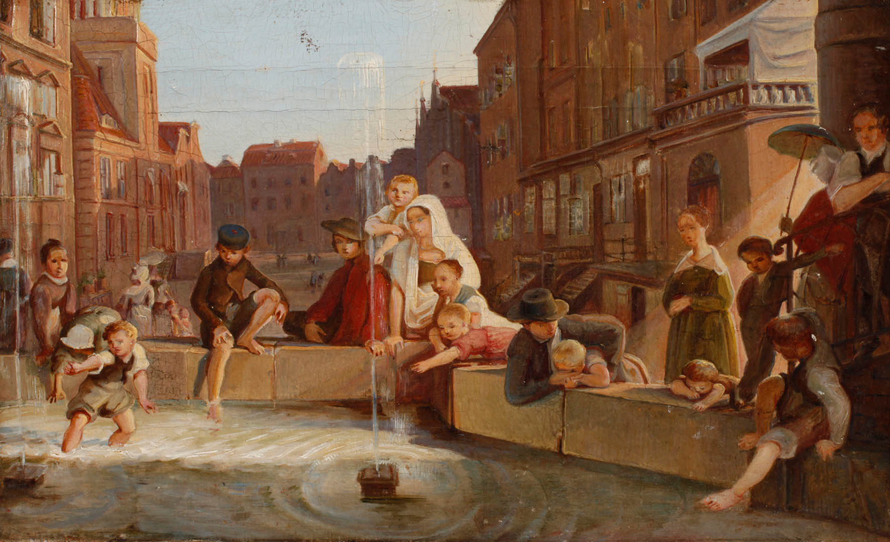 Julius Knorre (zugeschrieben): Scene am Springbrunnen zu Königsberg